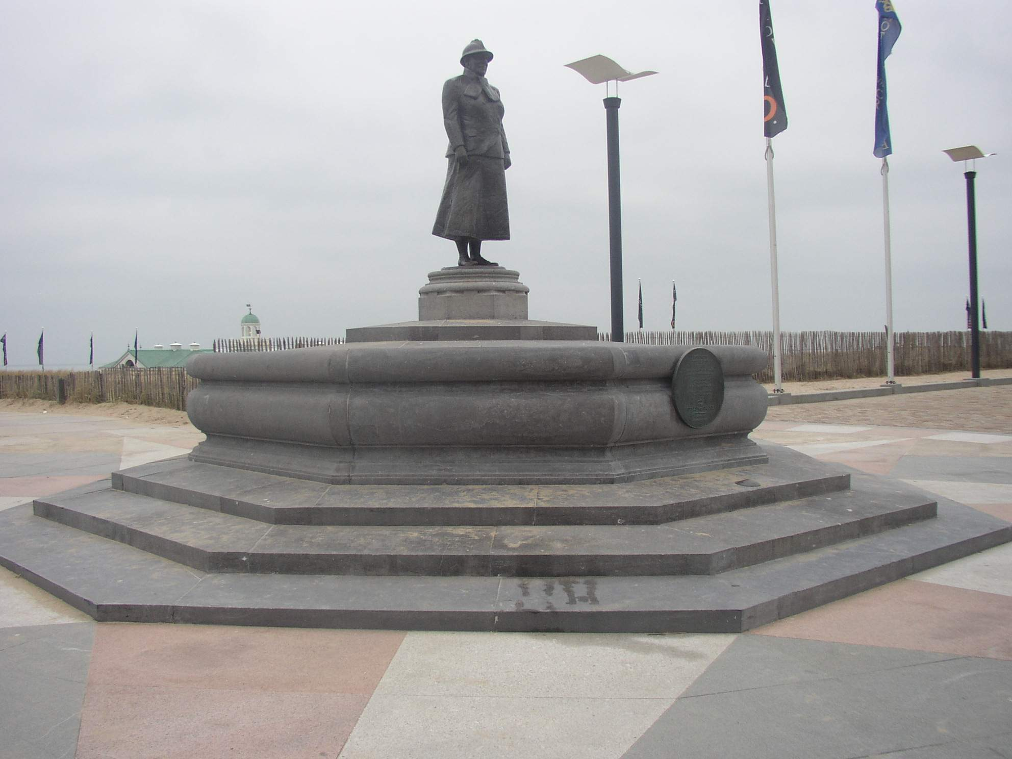 Standbeeld van Kees Verkade: Koningin Wilhelmina, op de gelijknamige boulevard in Noordwijk.